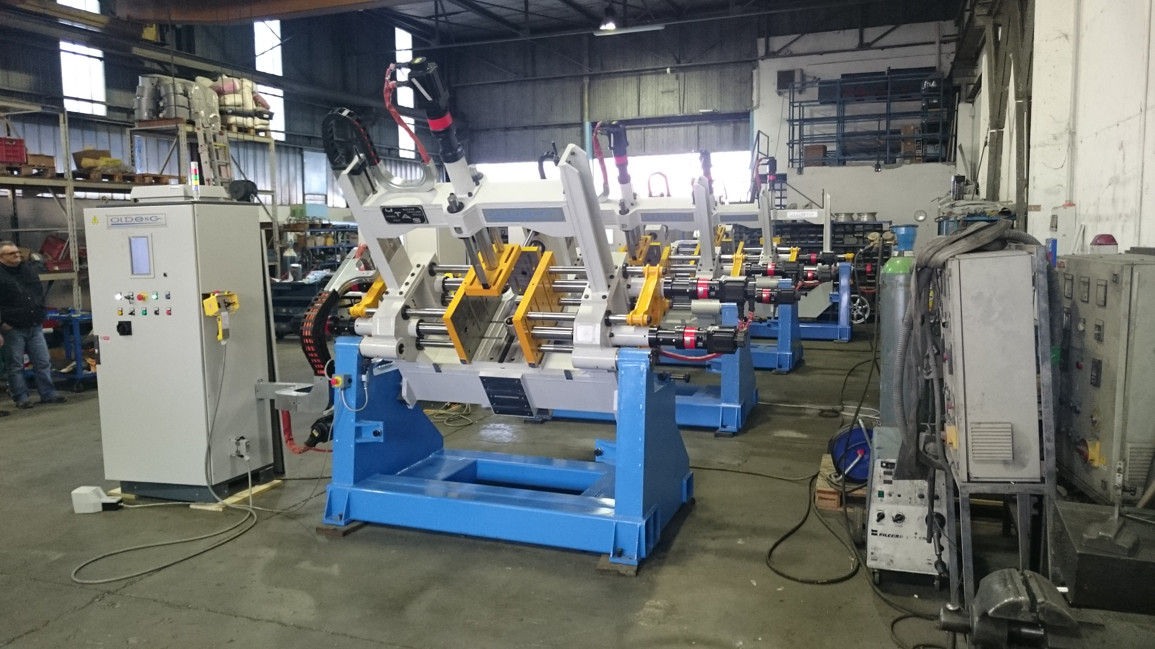 Кокильные машины для литья металлов